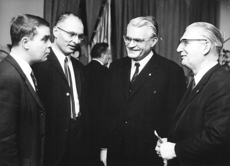 Zentralbild Gahleck 9-2-70 Leipzig: Tagung des CDU-Hauptvorstandes Aus Anlaß des 9. Jahrestages der Beratung christlicher Amtsträger mit den Vorsitzenden des Staatrates der DDR, Walter Ulbricht, fand eine Tagung des Präsidiums des Hauptvorstandes der CDU mit dem Parteivorsitzenden G. Götting und christlichen Persönlichkeiten statt. Während einer Pause v.l.n.r.: Pfarrer Dr. Frielingshaus (Dresden), Prof. Dr. Jenssen (Berlin), Gerald Götting und Staatssekretär Hans Seigewasser im Gespräch.